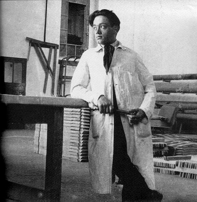 Flaminio Bertoni (Varese, 10 gennaio 1903 – Antony, 7 febbraio 1964) è stato un designer e scultore italiano.